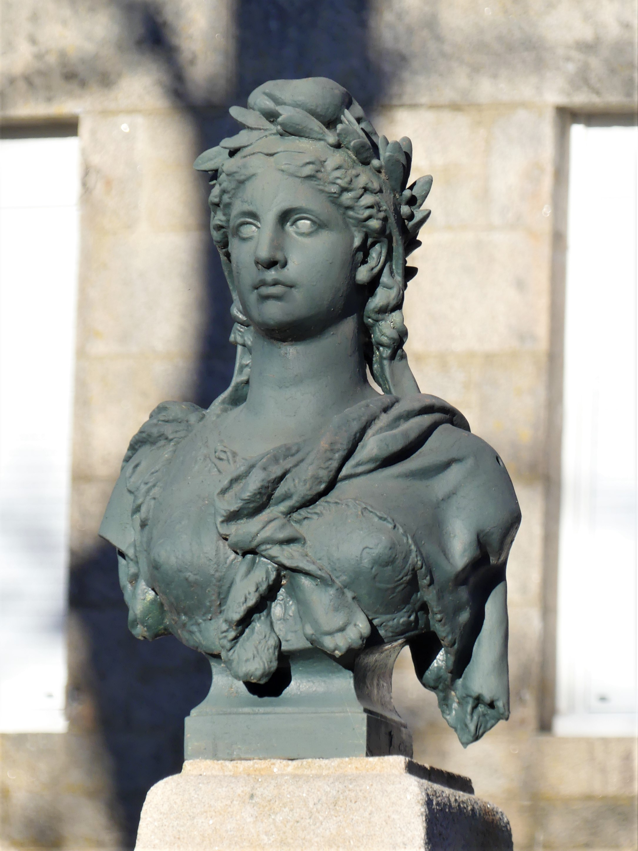 Buste de Marianne érigé rue Nationale, face à la rue de la Liberté, Bugeat, Corrèze, France.